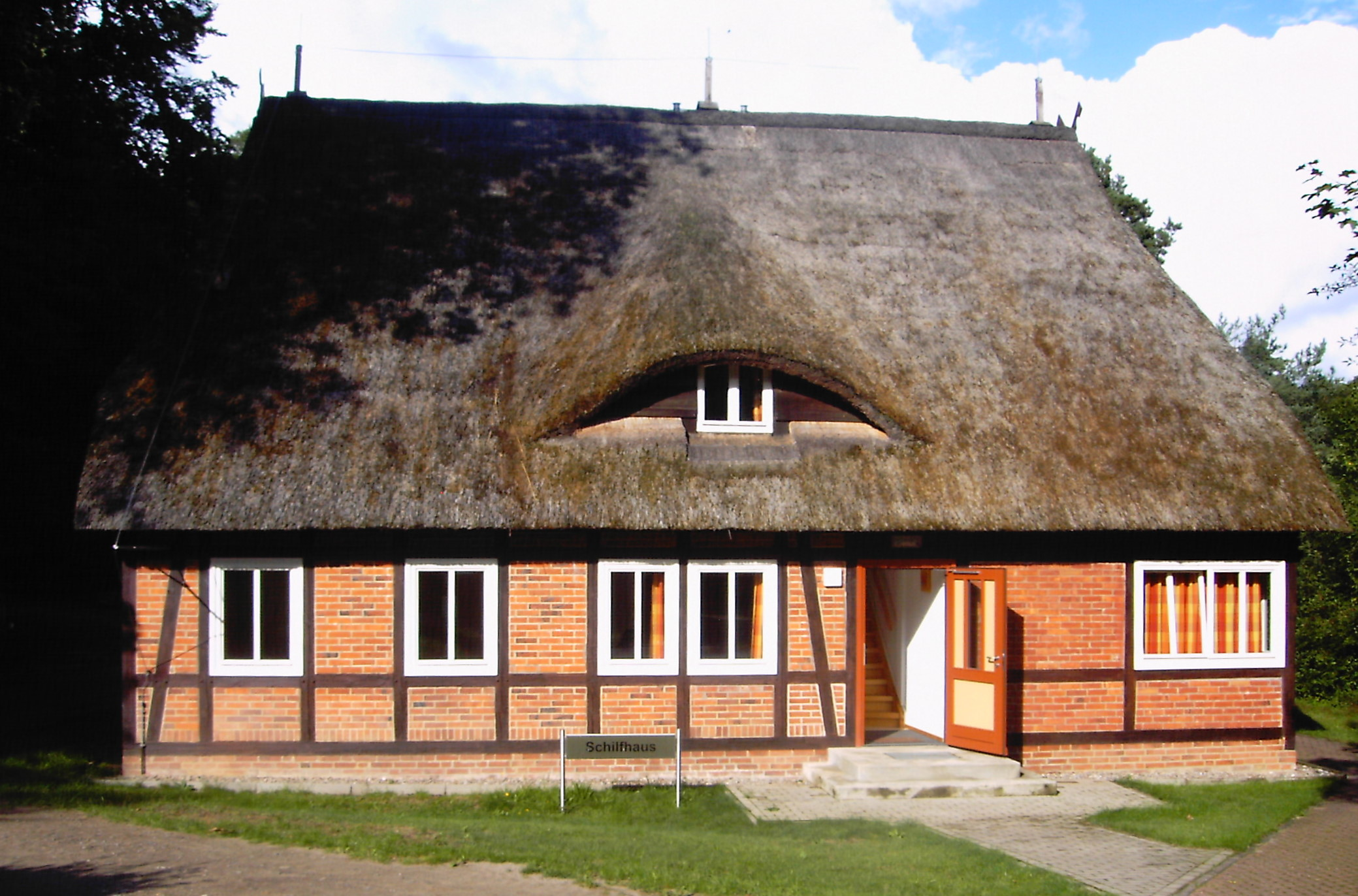 Schilfhaus in Kunsterspring, einem Ortsteil von Gühlen Glienicke, zugehörig zu Neuruppin, Brandenburg, Deutschland. Das erste Gebäude der Ausbildungsstätte der heutigen Landesforst Brandenburg war das 1935 erbaute Schilfhaus.